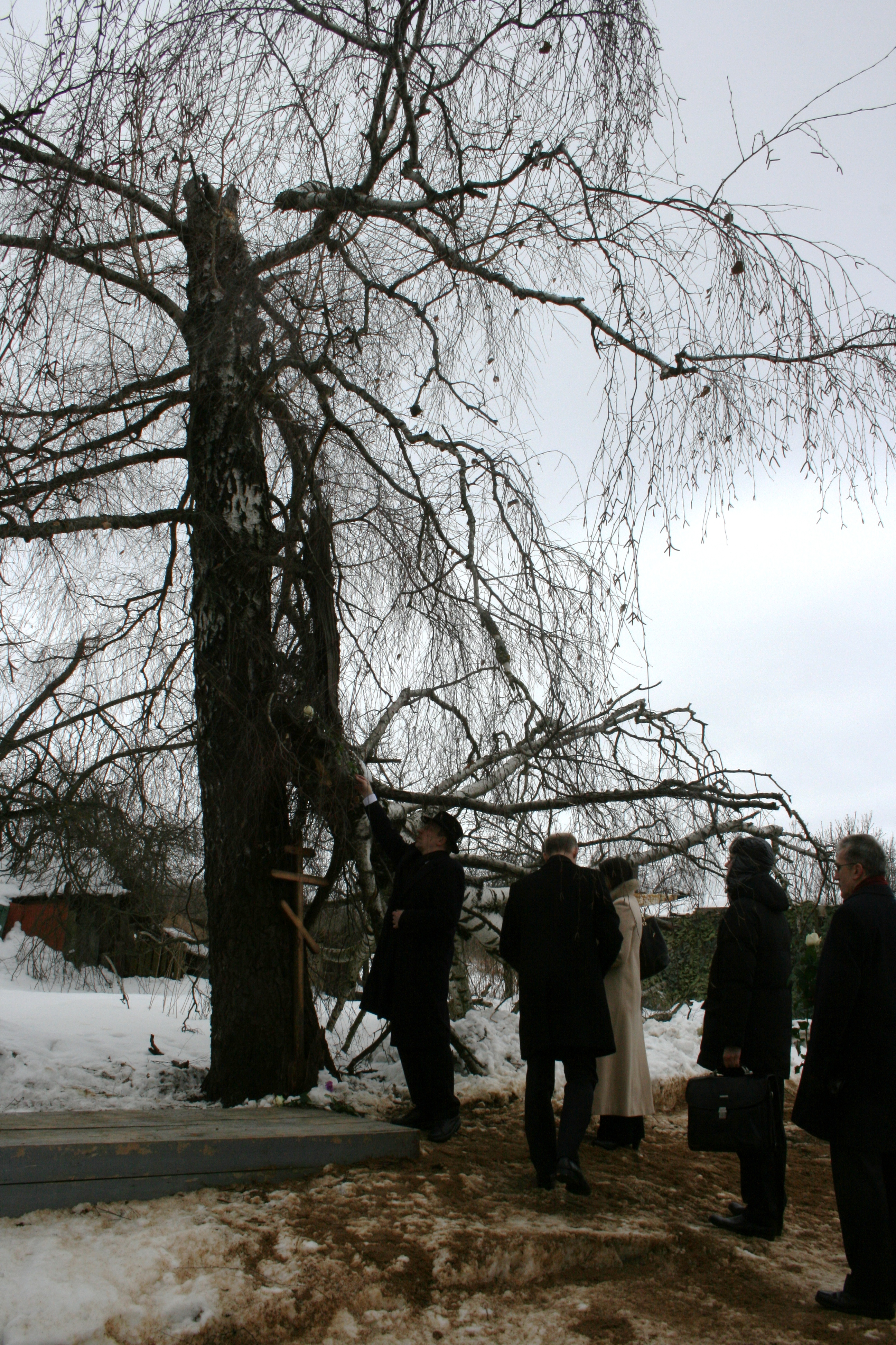 Беларуская (тарашкевіца): Міністар Багдан Здраеўскі ўскладае кветкі пад смаленскую бярозу. 10 красавіка 2010 року